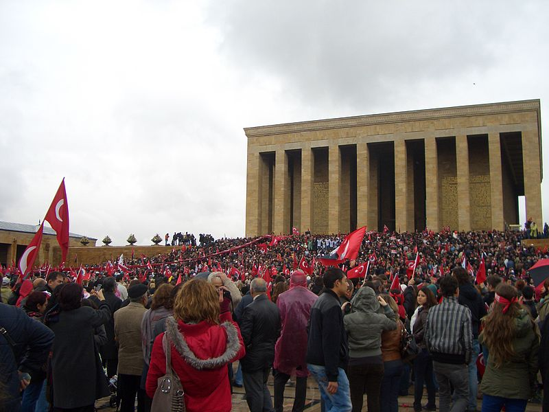 10 Kasım Atatürk'ü anma günü ve Atatürk Haftası. 2012 yılı, Ankara-Anıtkabir (3).